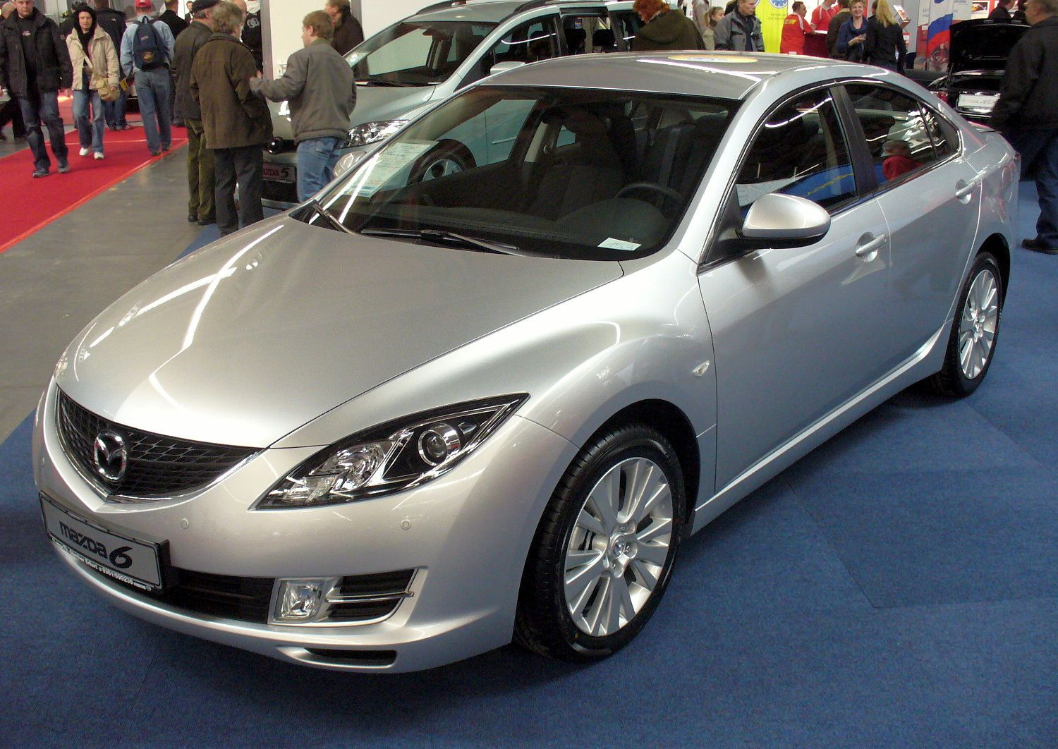 Mazda6 II